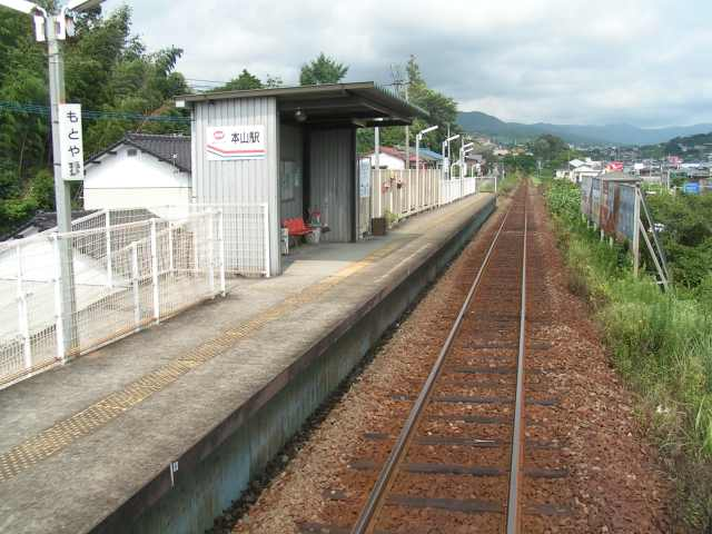 本山駅 投稿者が撮影(2006/08/28)